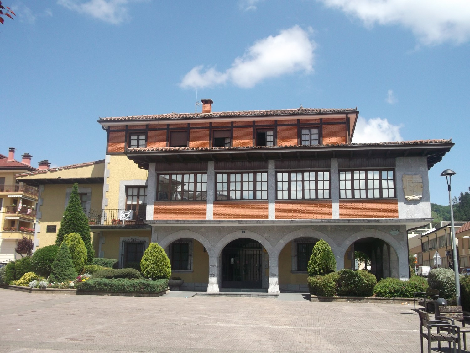 Ayuntamiento